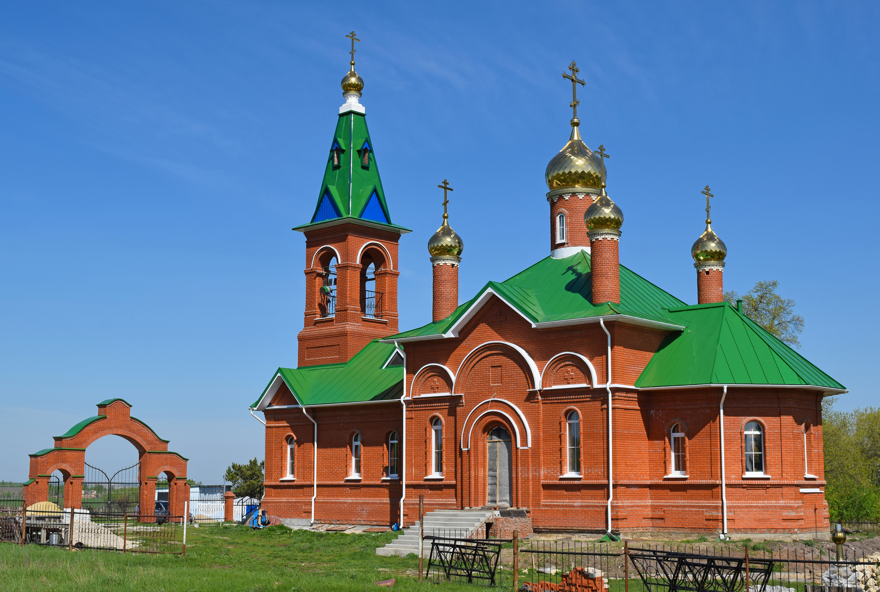 Воскресенский храм поселка Побединка, Скопинский район Рязанской области